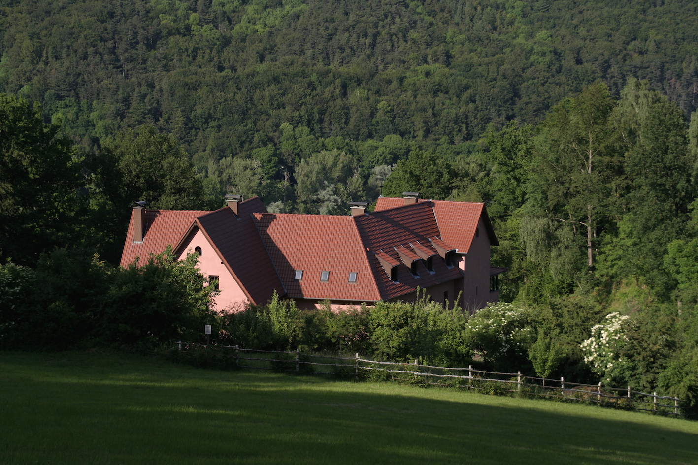 Blick auf das Dreifaltigkeitskloster Buchhagen